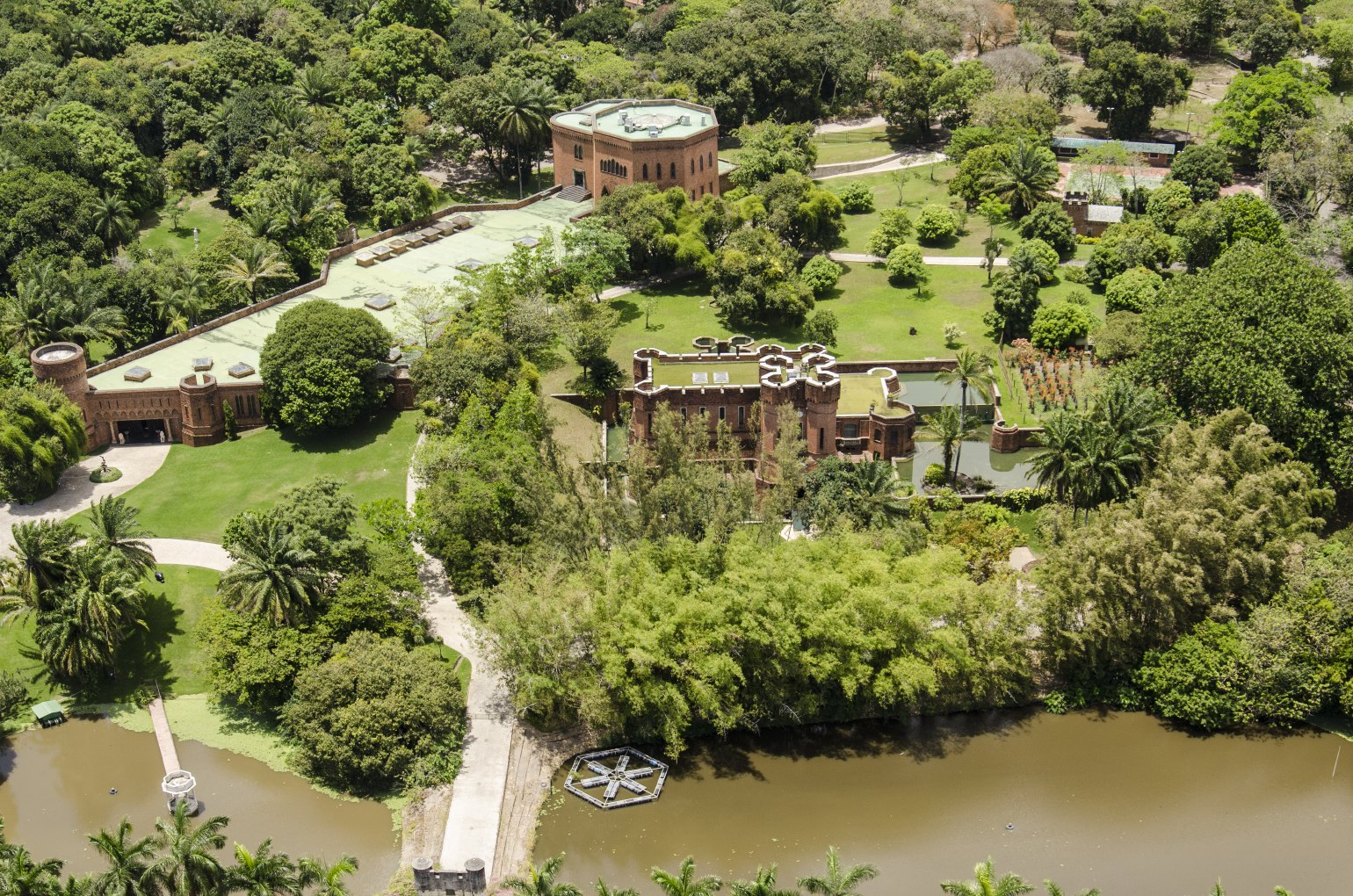 Castelo Brennand (Instituto Ricardo Brennand) - Recife - Pernambuco - Brasil